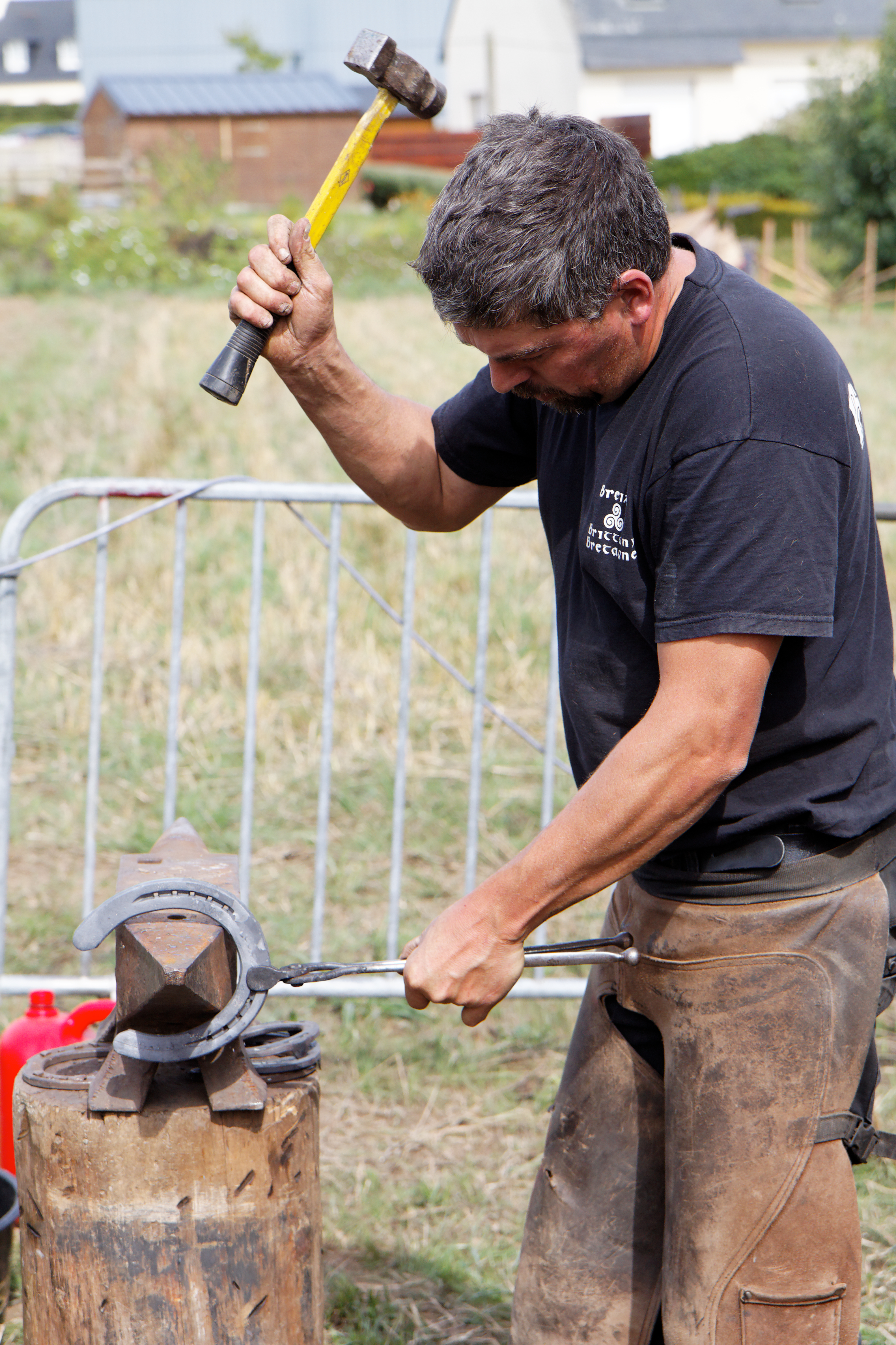 Étape 4 : Préparation du fer, mise en forme à chaud.